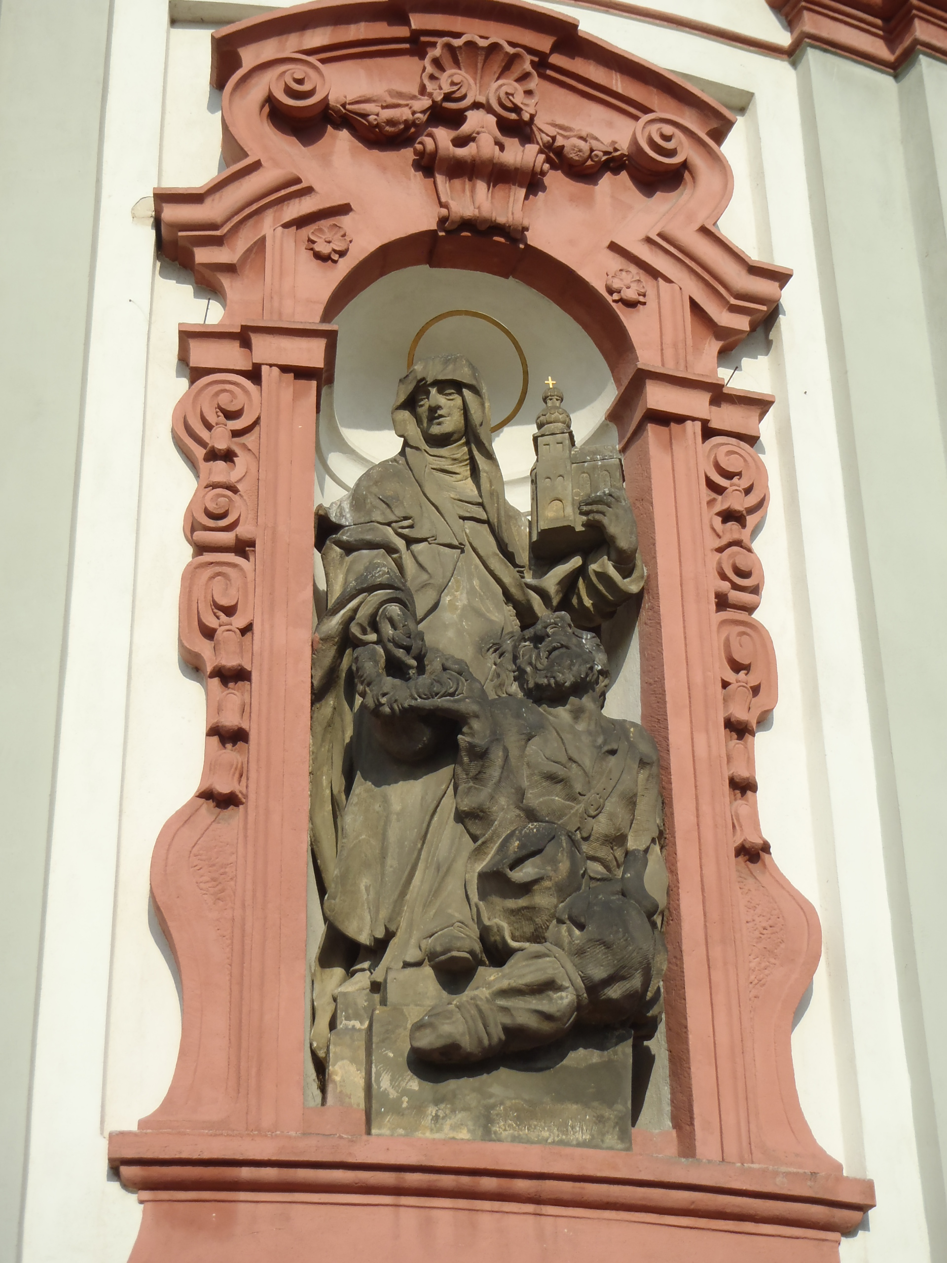 Klášter dominikánů s bazilikou svatého Vavřince a svaté Zdislavy, Klášterní 33, Jablonné v Podještědí.